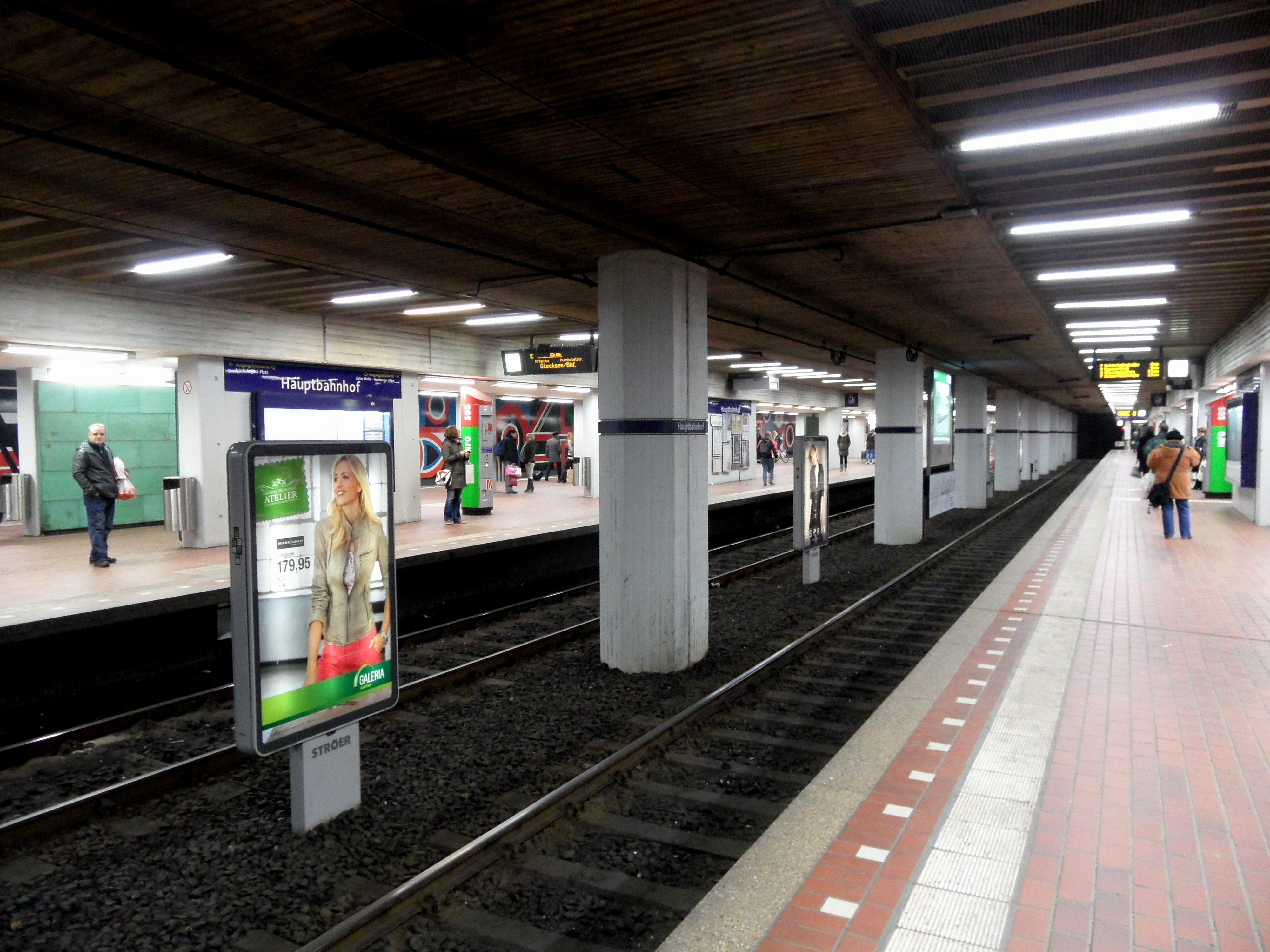 Hannover Hauptbahnhof - Tunnelhaltestelle der Stadtbahn